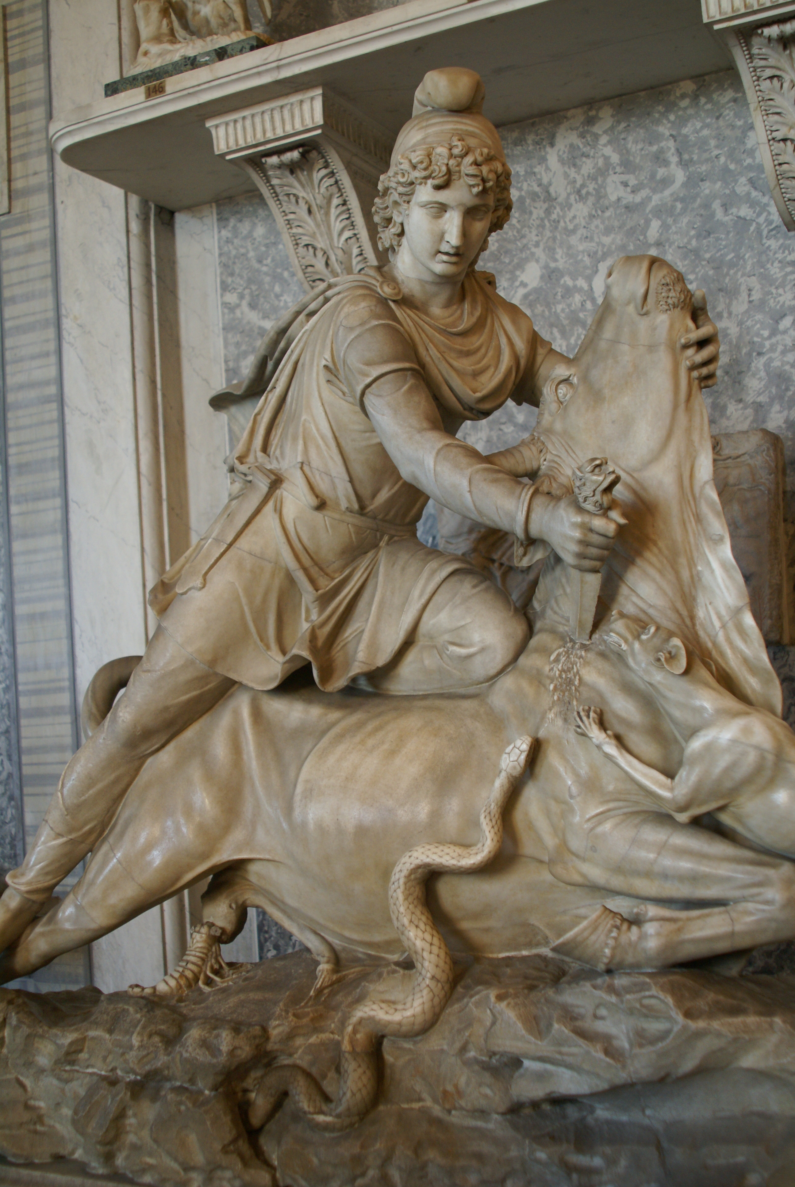 Mitra matando al toro, mientras lo ataca también un escorpión y una serpiente.